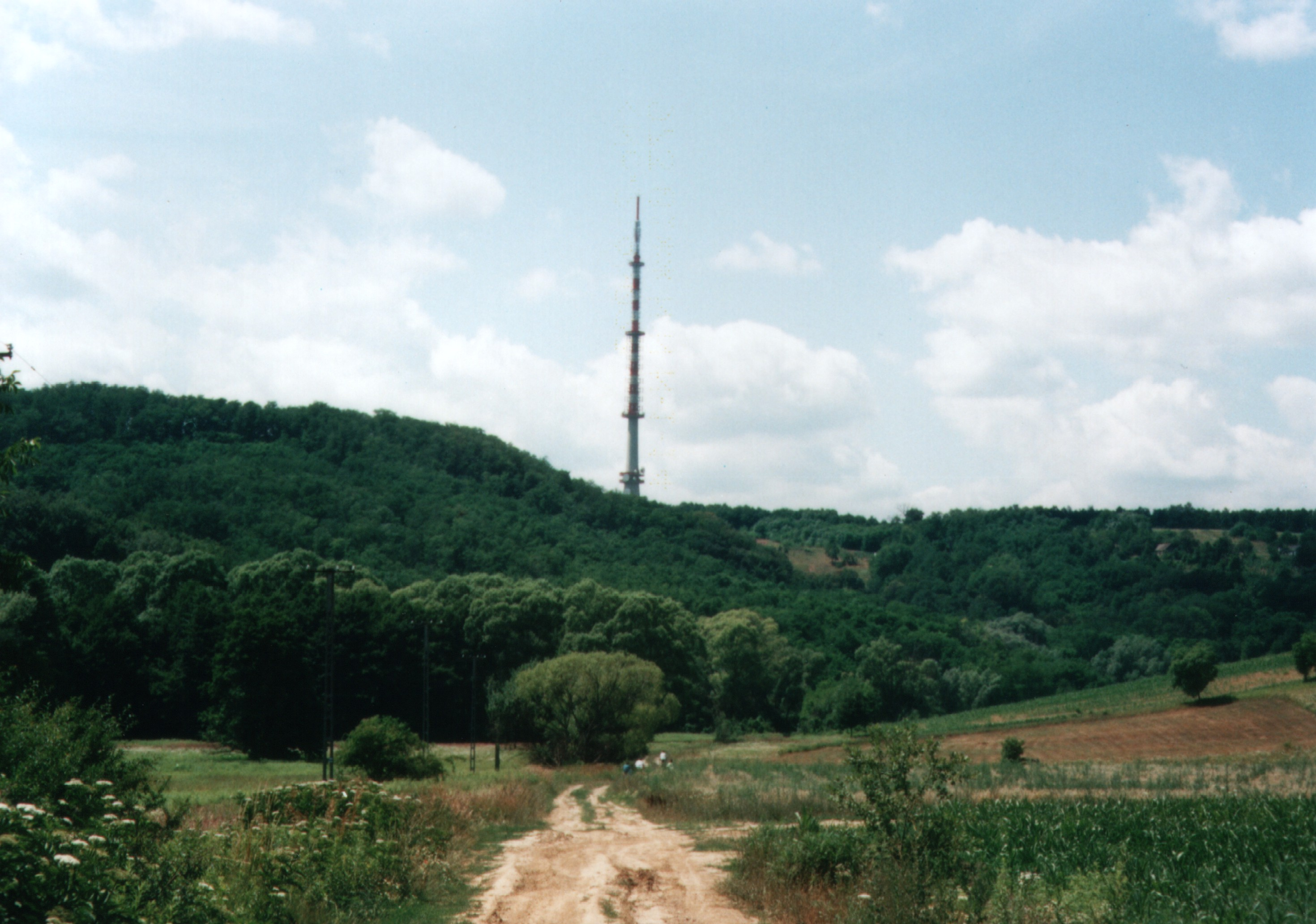 Nagybakónak (Zala County), az Árpád-forráshoz vezető út